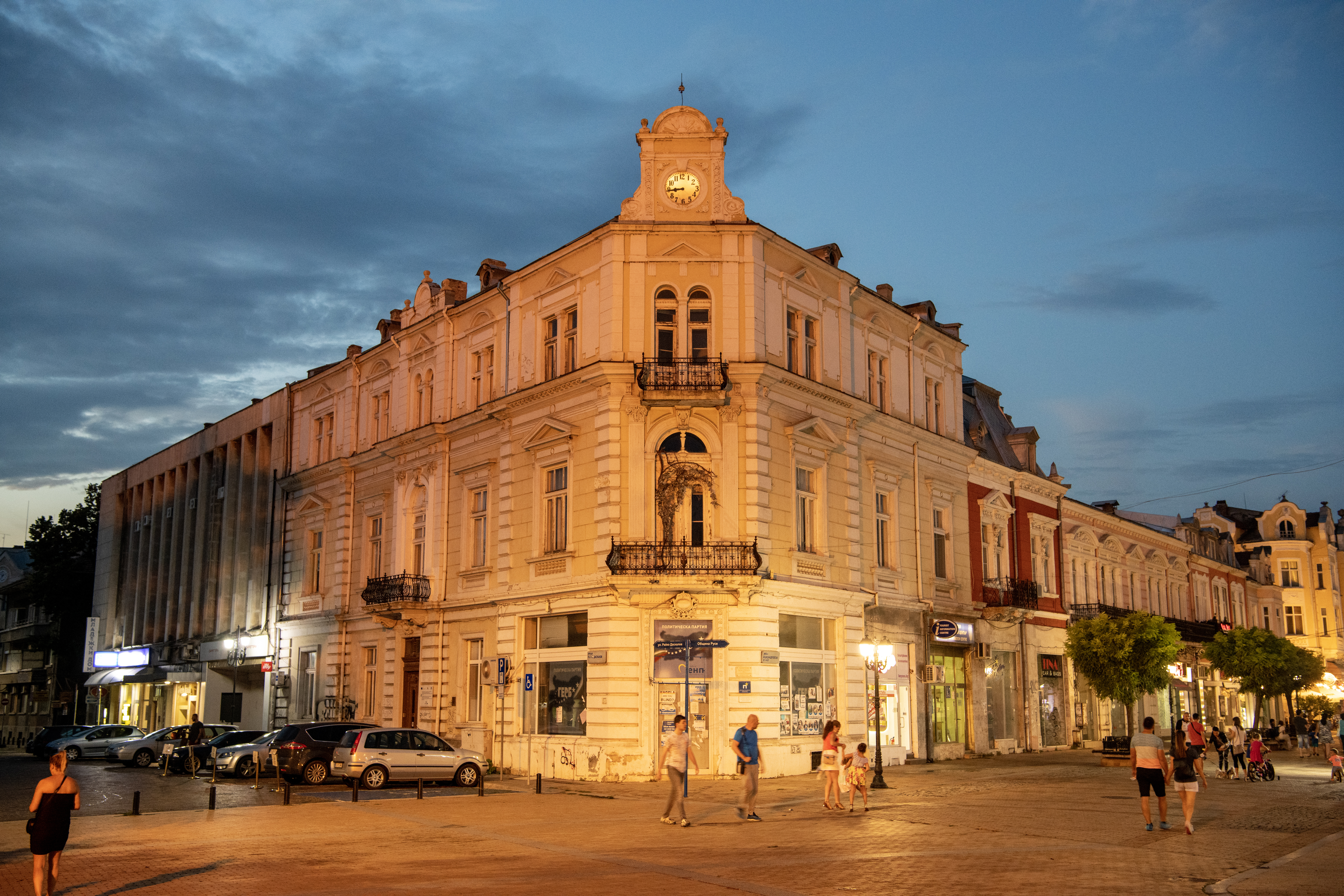 Снимката документира сградата на акционерно спестително дружество „Гирдап“ (Часовникът)